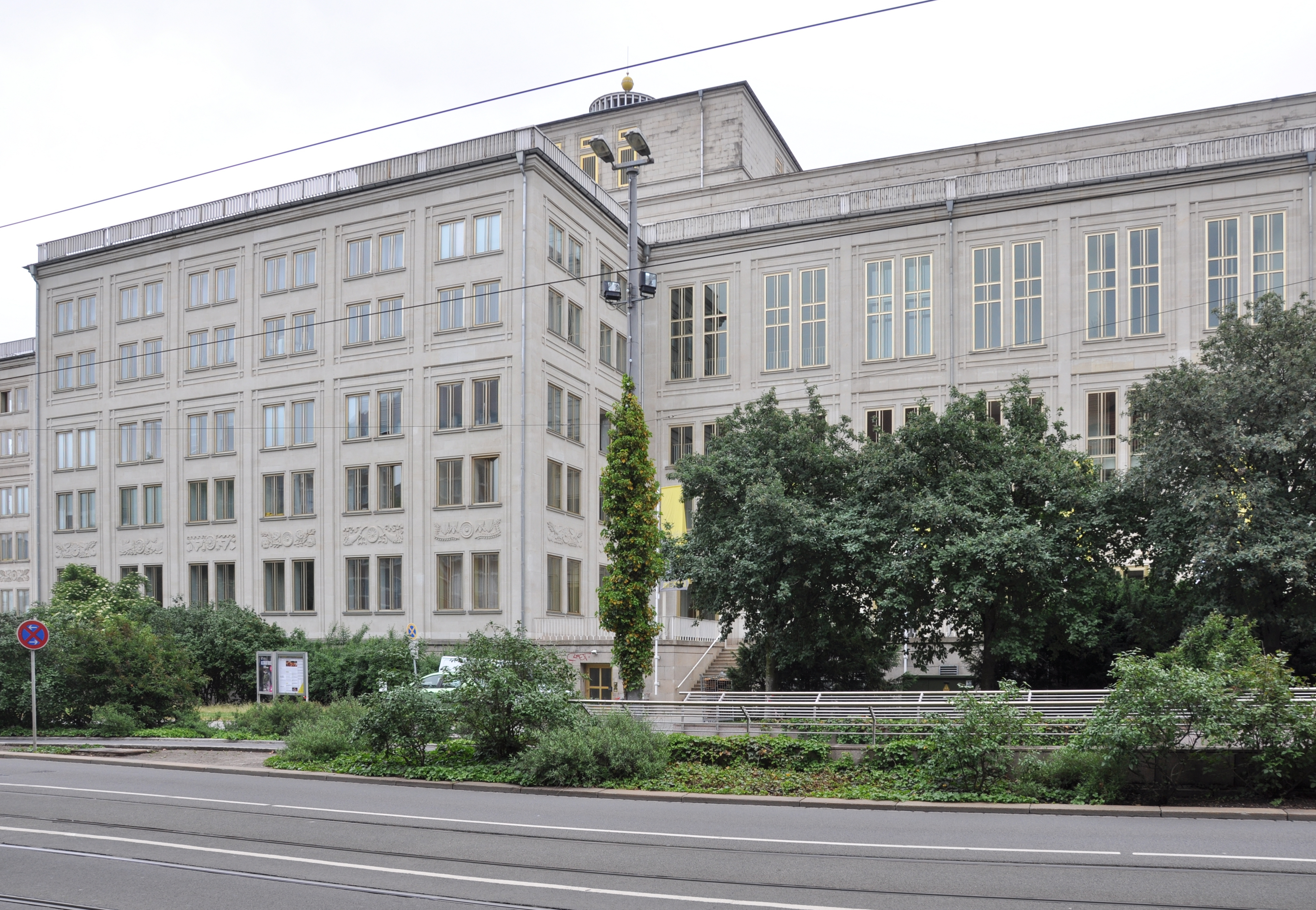 Leipzig, Opernhaus